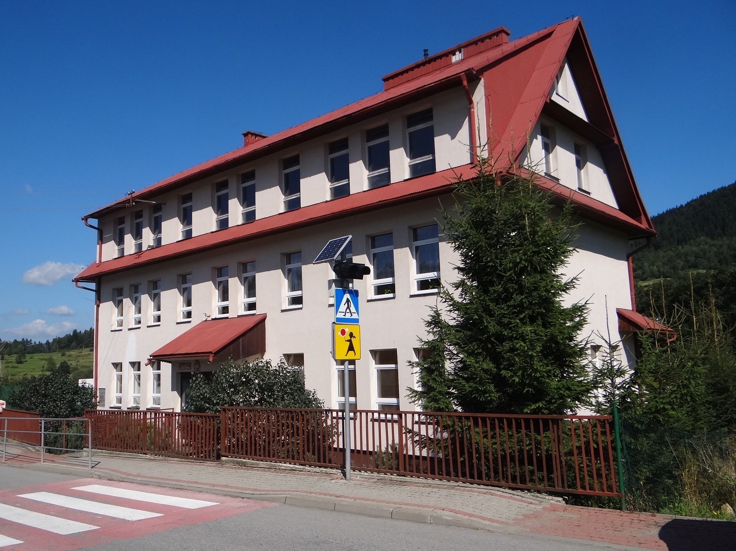 Szkoła w Chyszówkach